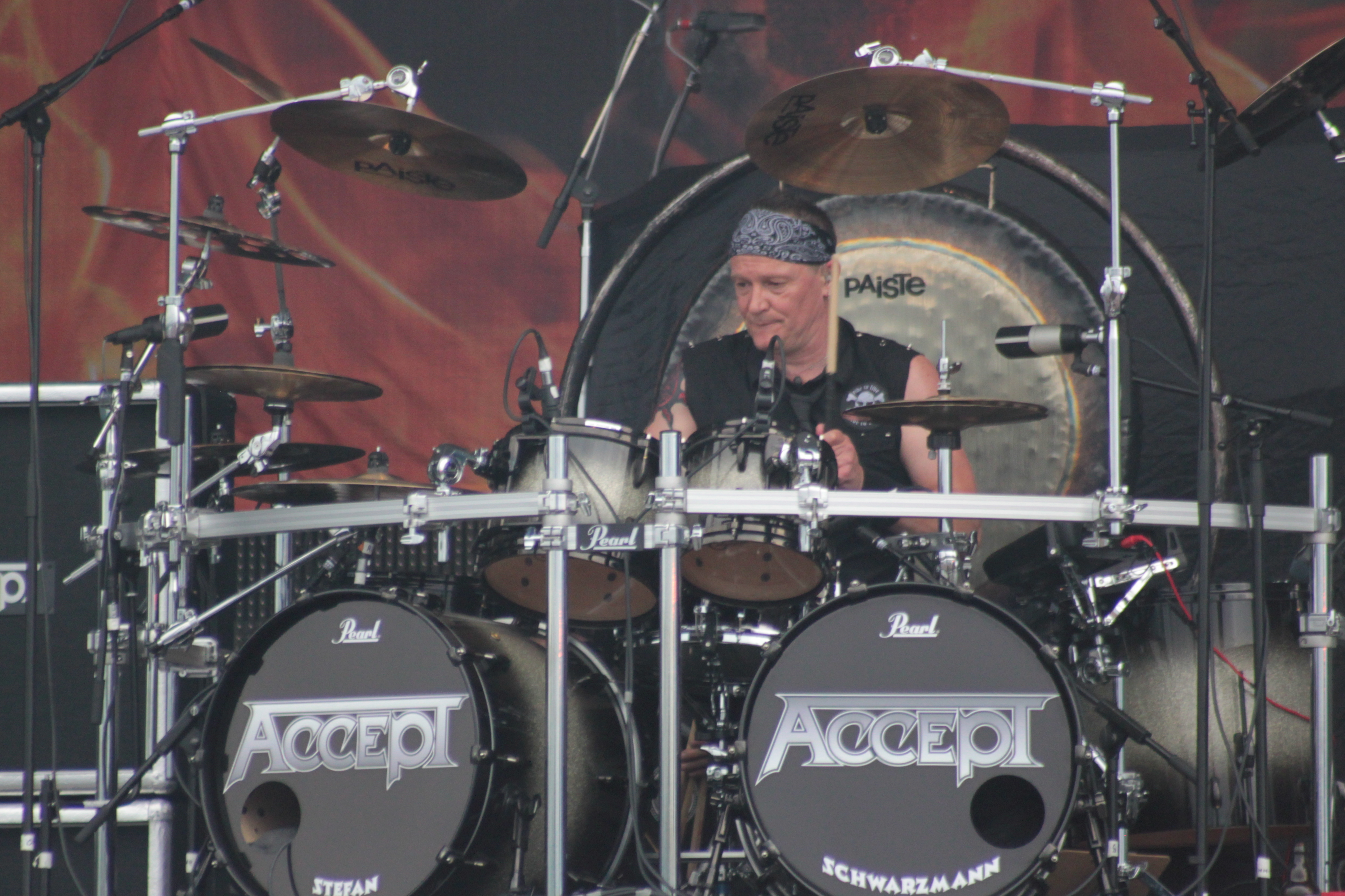 Stefan Schwarzmann, Accept, Helfest 2013, Fr-44-Clisson.